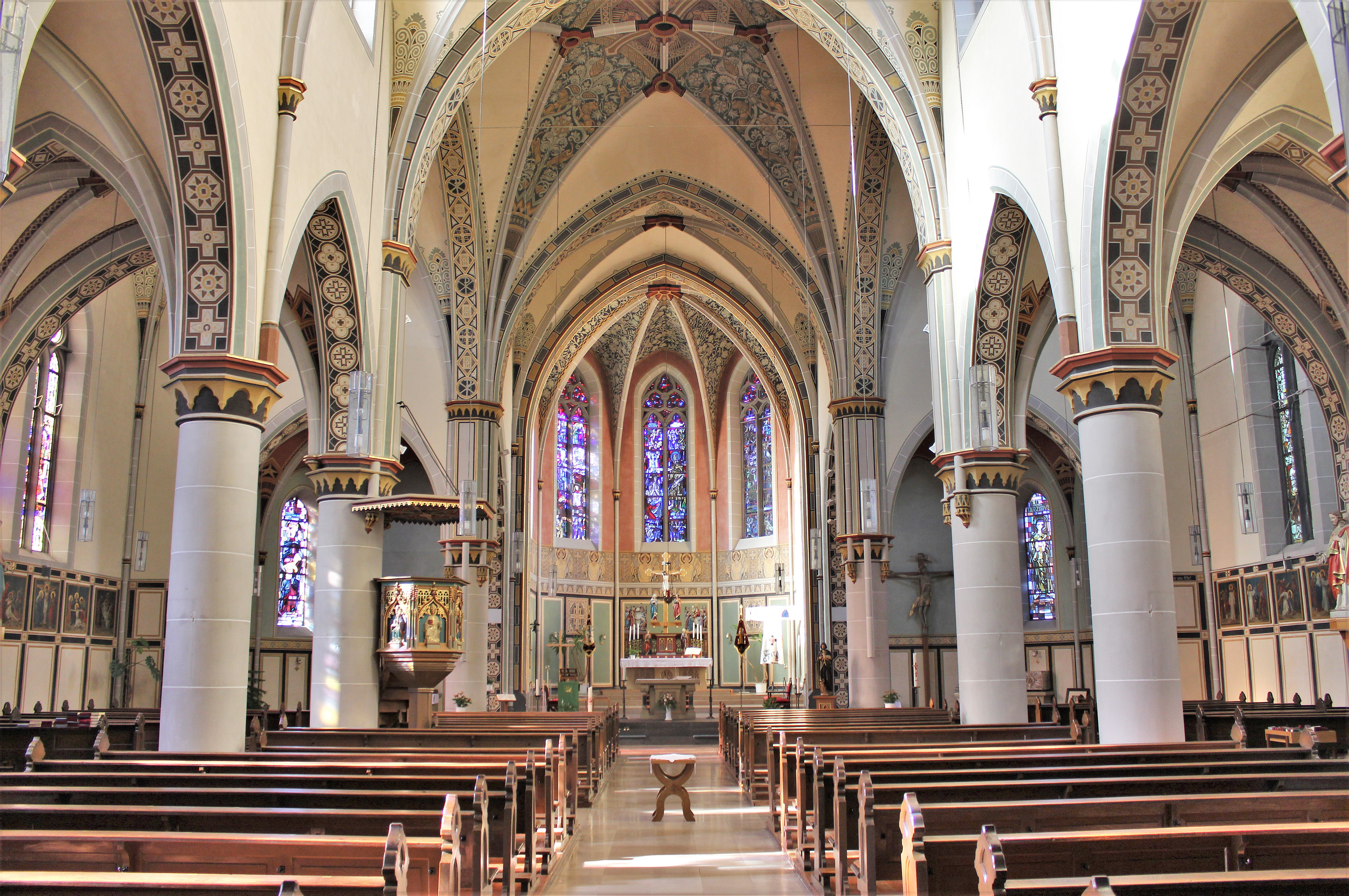 Blick ins Innere der katholischen Pfarrkirche St. Johannes Baptista in Altenkessel, einem Stadtteil der saarländischen Landeshauptstadt Saarbrücken